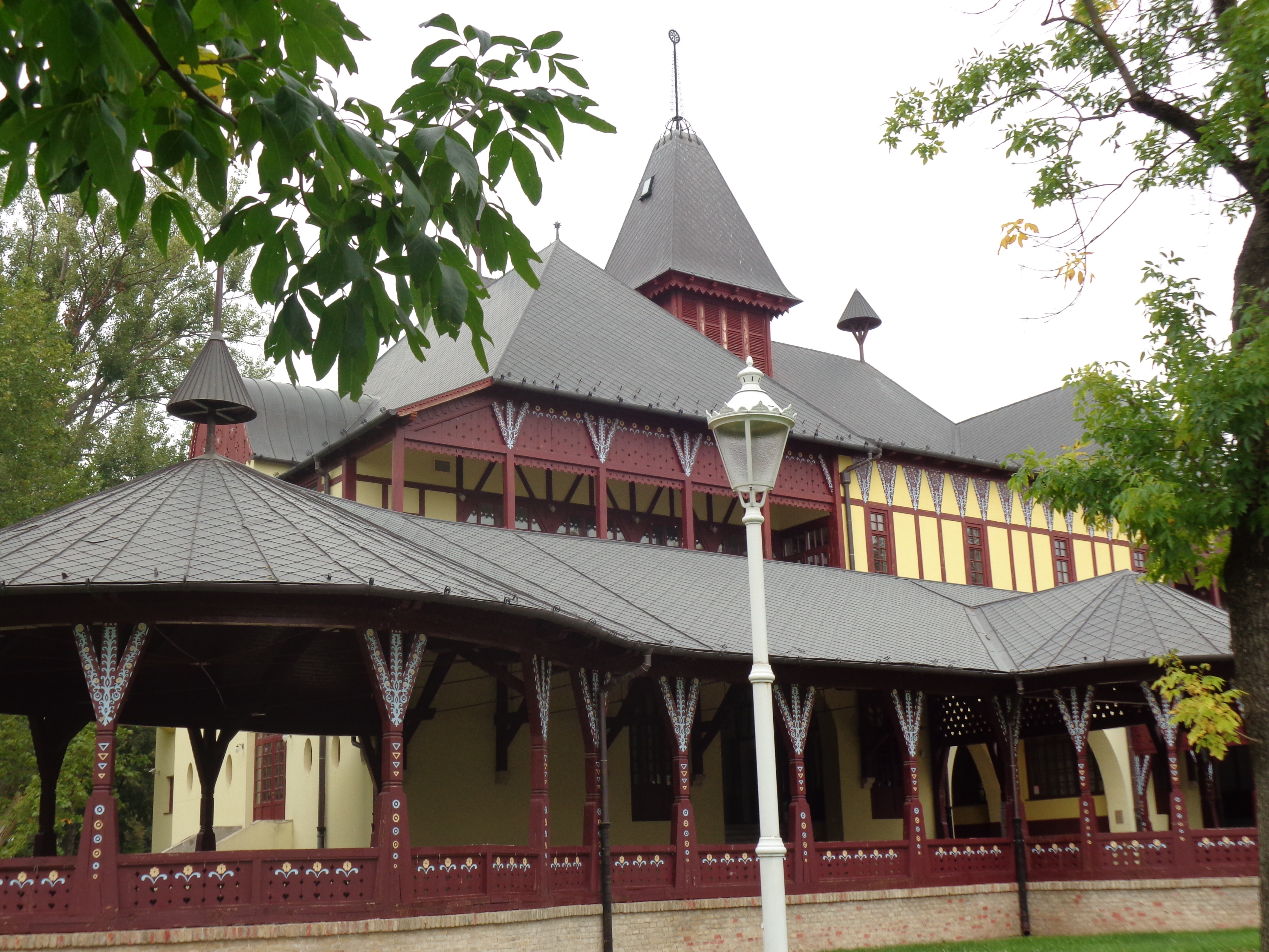 Велика тераса на Палићу